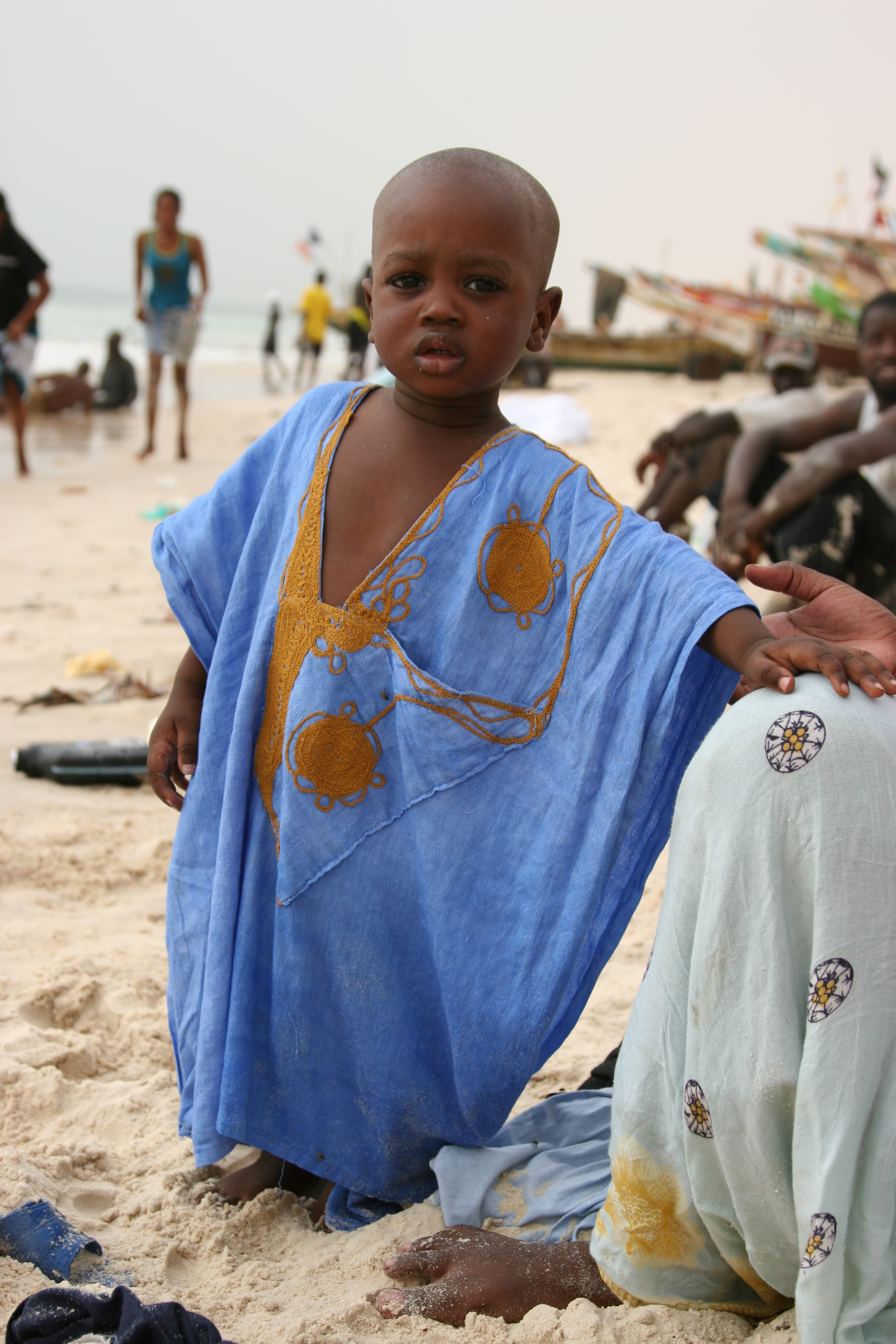 Mauritania, September 2008